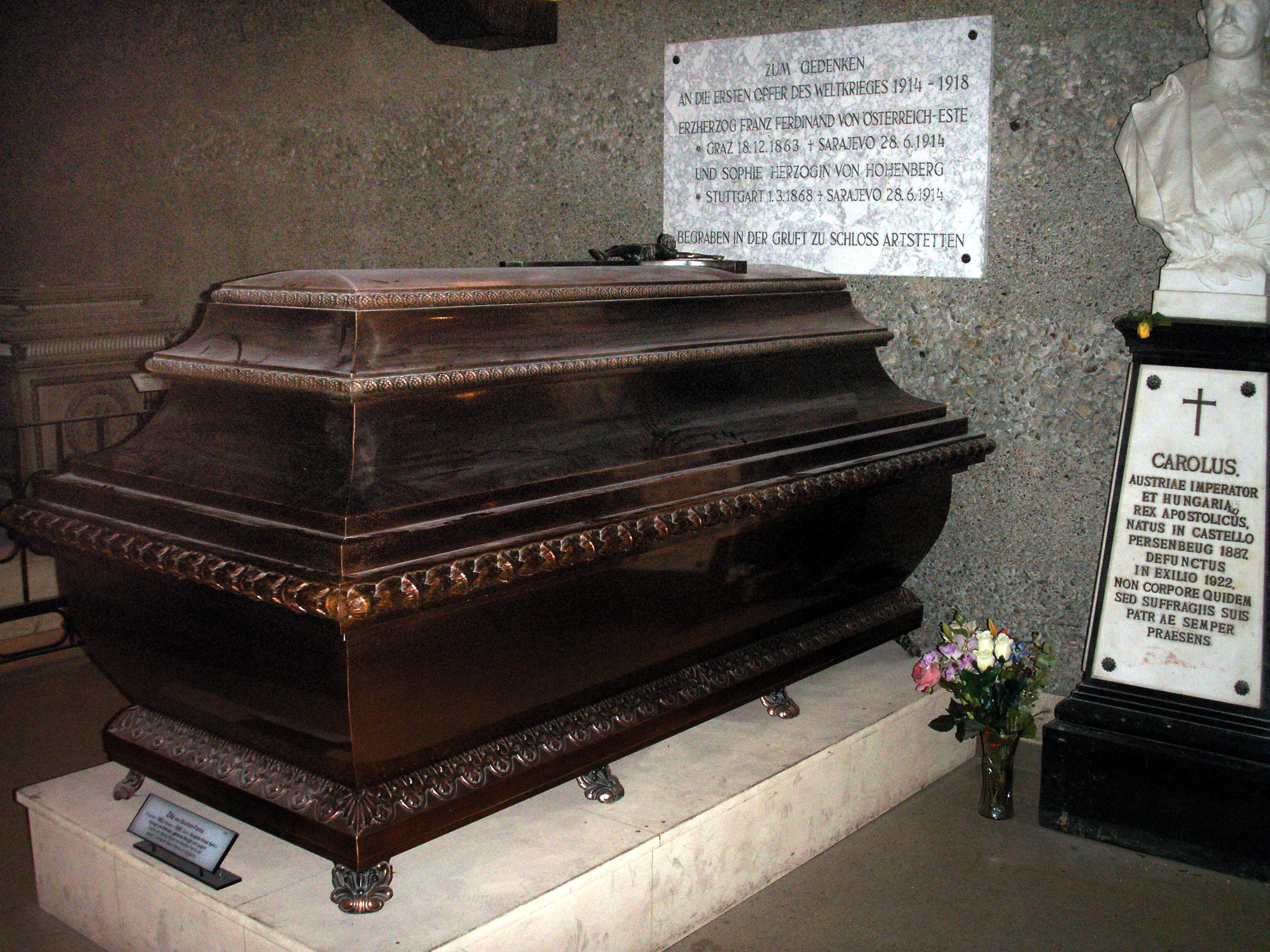 Kapuzinergruft, Wien, Sarkophag Kaiserin Zita, letzte Kaiserin Österreichs